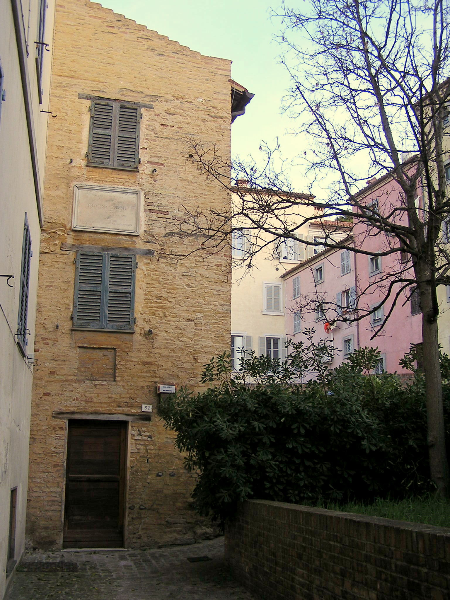 Casa natale di Francesco Podesti, con lapide dedicatoria posta nel 1883 quando il pittore era ancora in vita. Si trova nel rione di Capodimonte nella via che è stata intitolata a Podesti